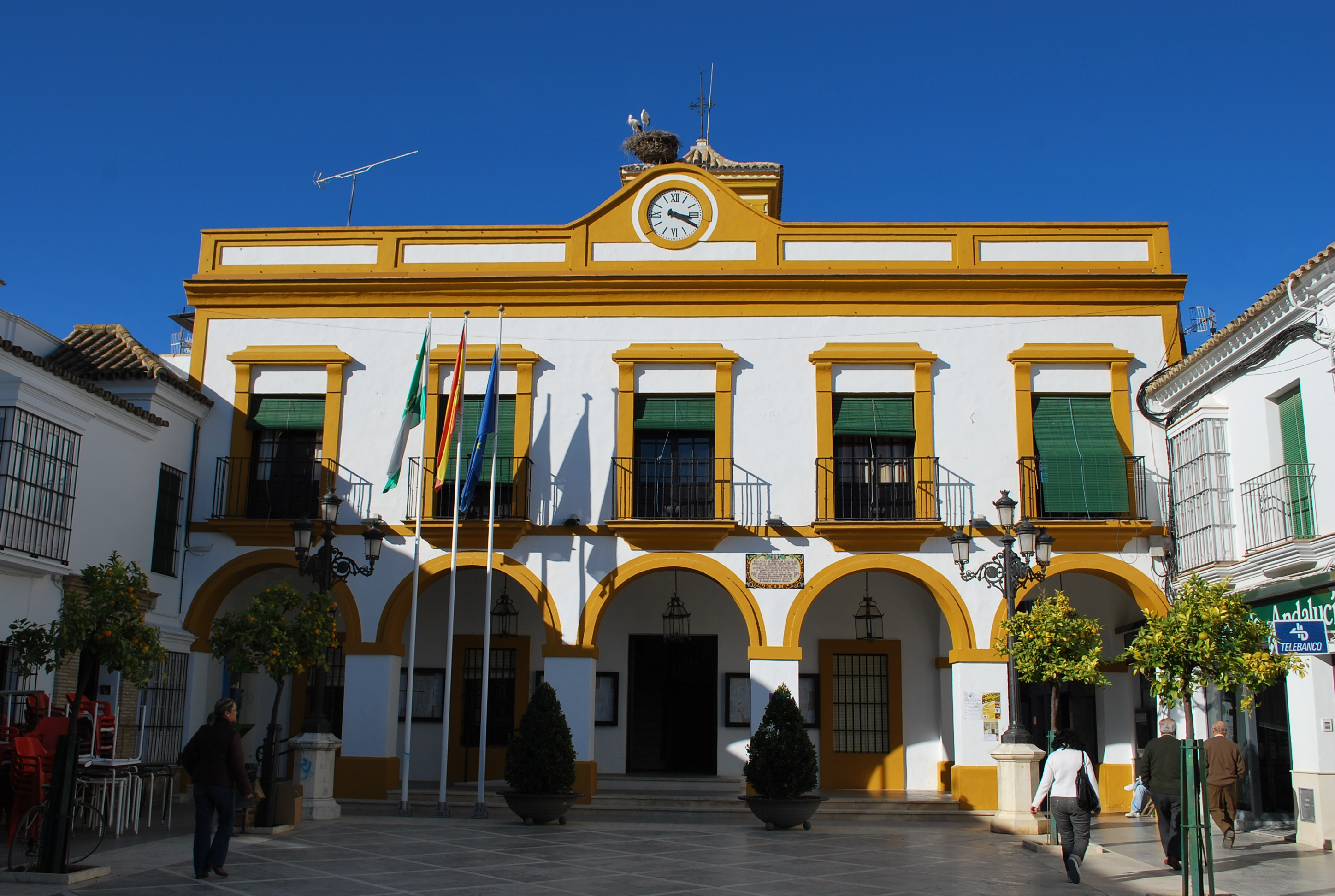 Ayuntamiento de La Puebla de Cazalla, Sevilla, España